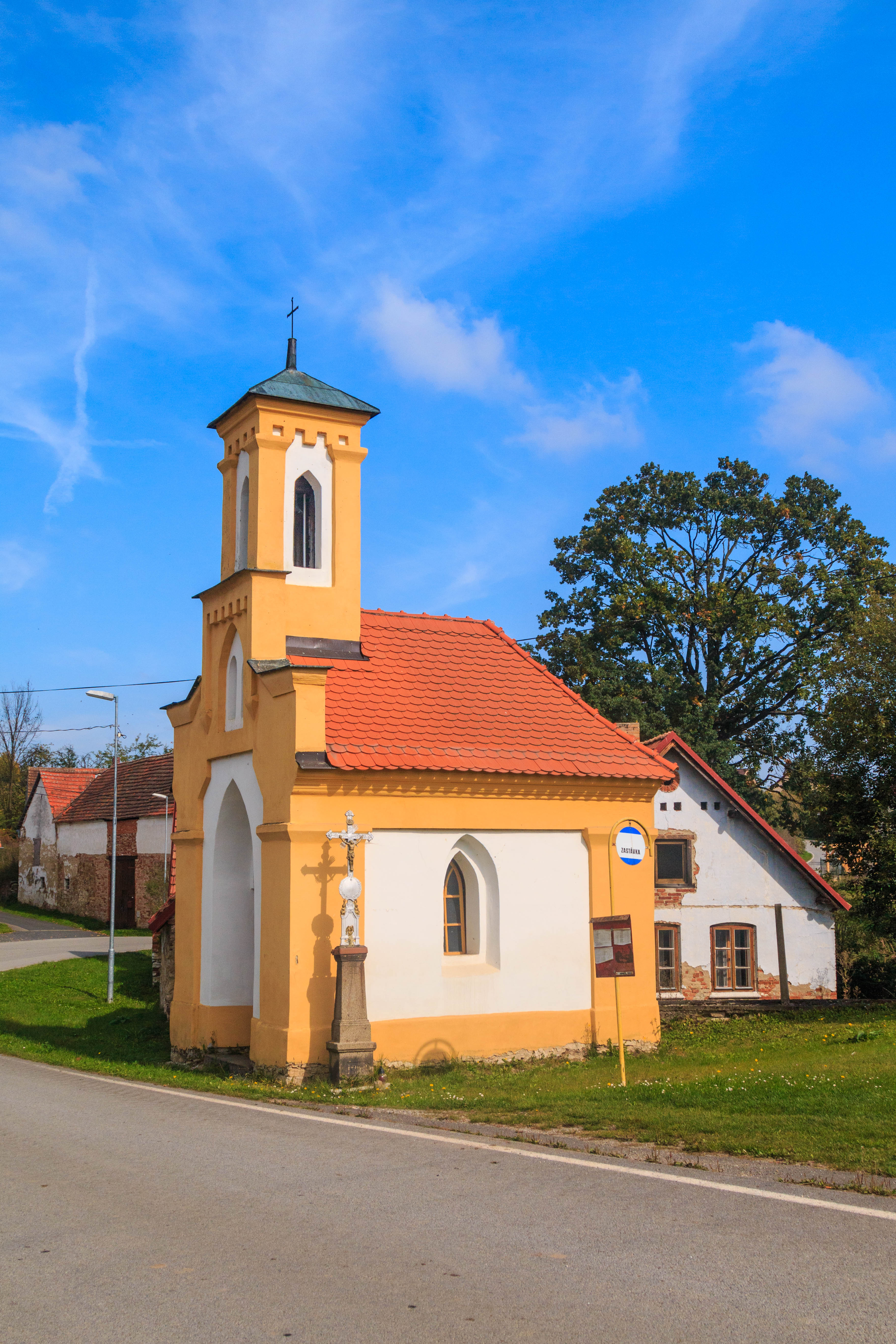 Podolí u Radomyšle - kaple